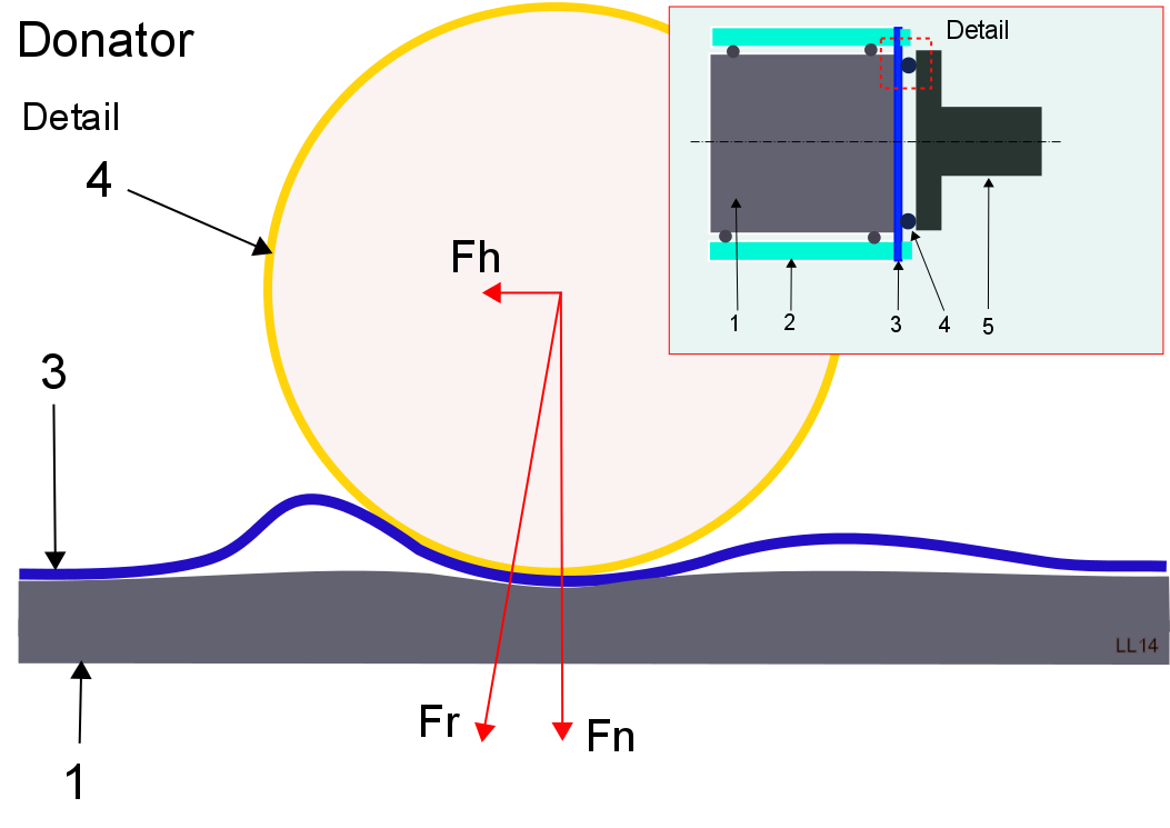 Donator principle. 1 Stator 2 Rotor. 3 Foil. 4 Ball. 5 Rotation element.